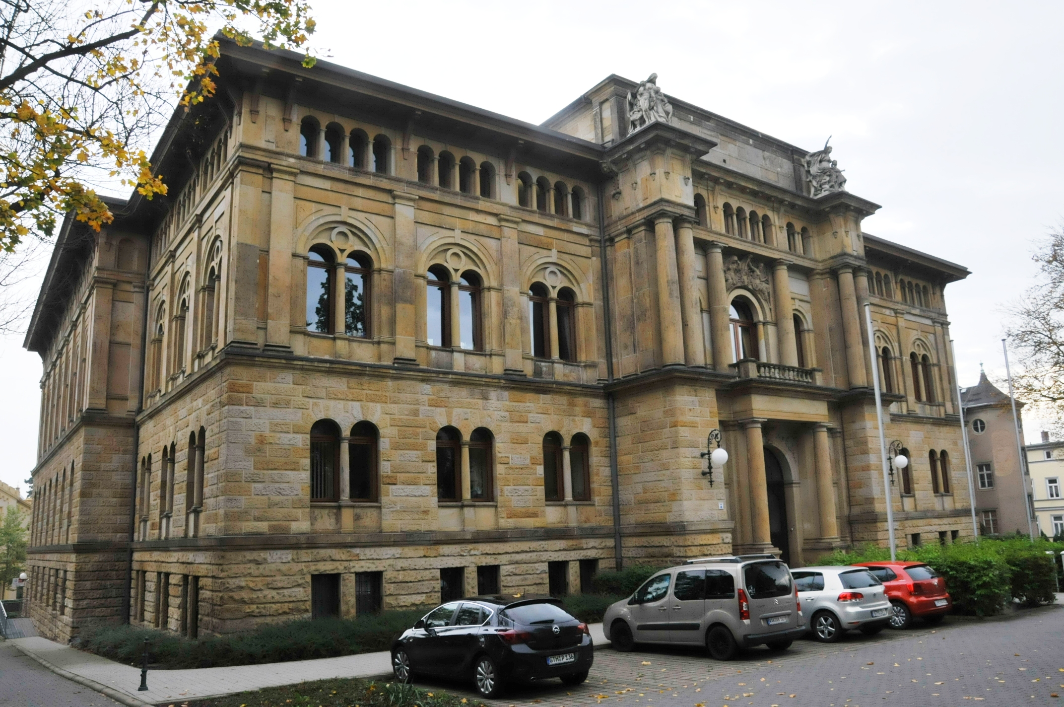 Gotha, Bahnhofstr. 3a, Lebensversicherungsbank Gotha, Deutsches Versicherungsmuseum "Ernst Wilhelm Arnoldi"